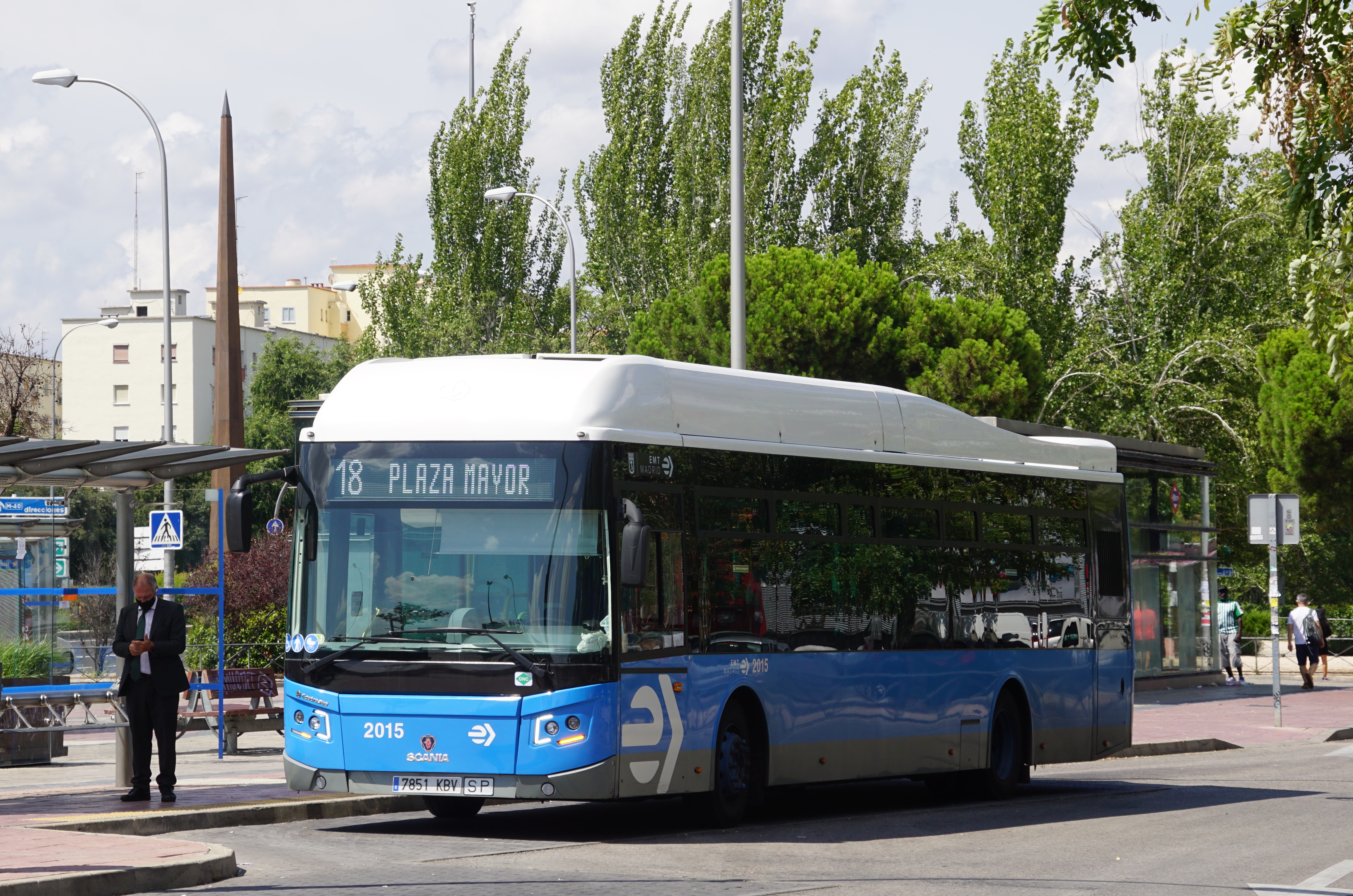 Final 18 EMT Madrid en Villaverde Cruce